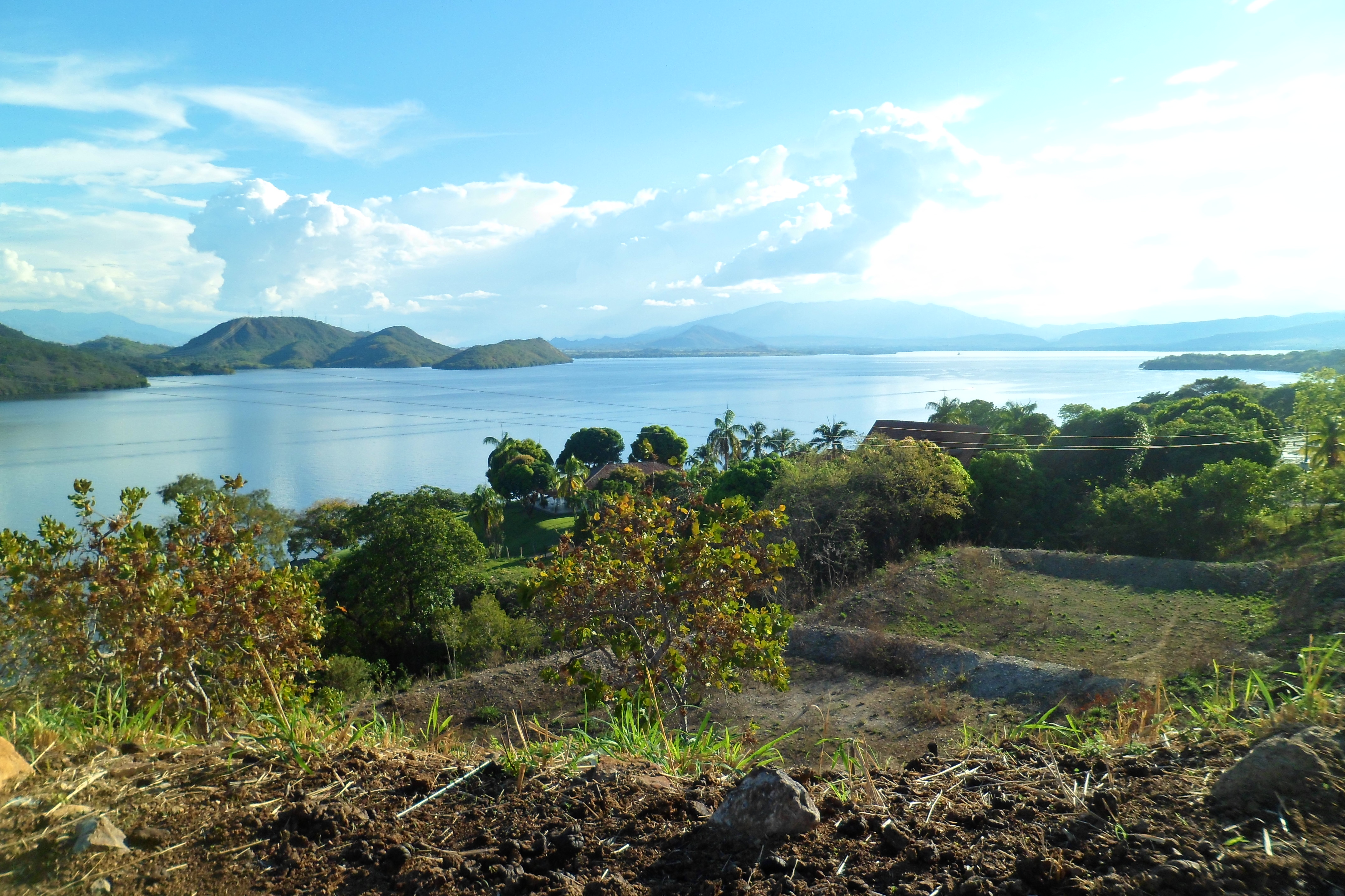 Embalse de Betania, Yaguará - Huila